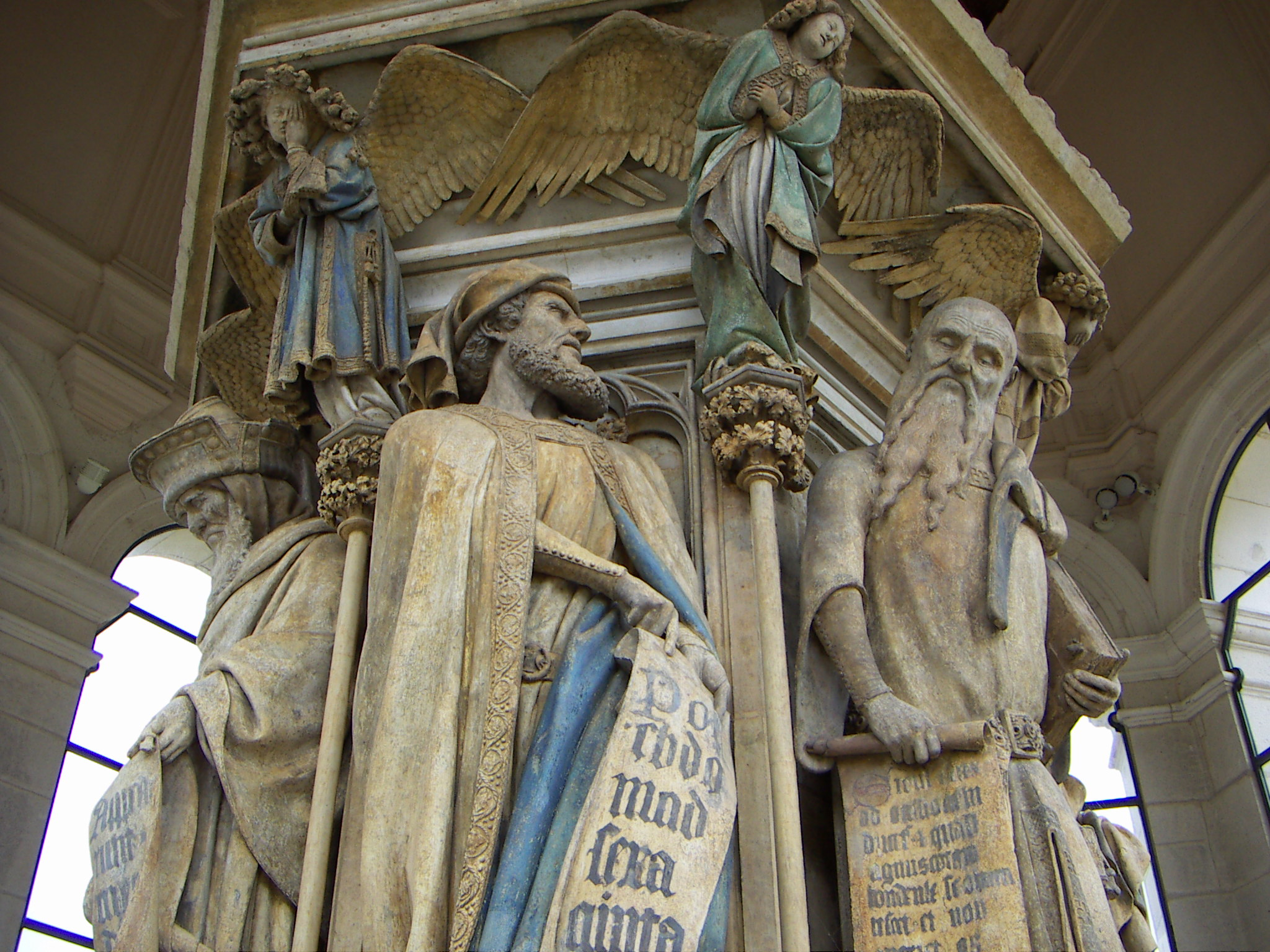 Puits de Moise, Dijon